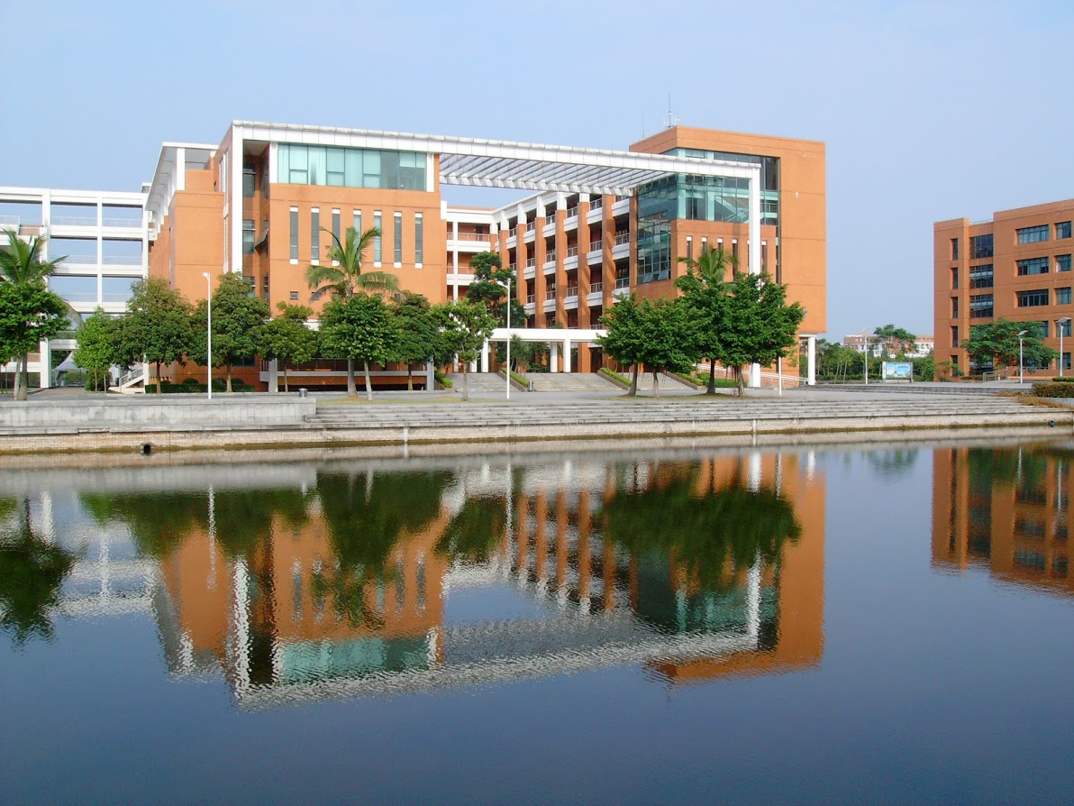 华南理工大学大学城校区A3